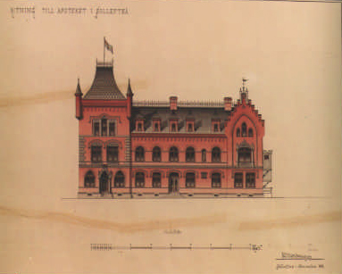 Ritning av Apotekshuset i Sollefteå. Ritning utförd av L N Wahrgren 1889. Ritningen finnes på Sollefteå kommunarkiv.